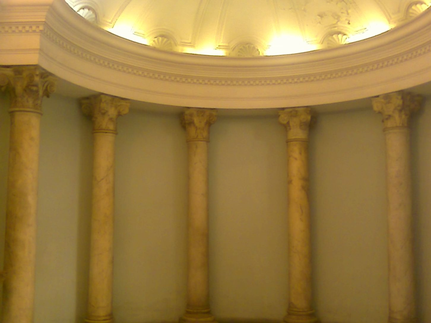 Aspreno al Porto: Columns